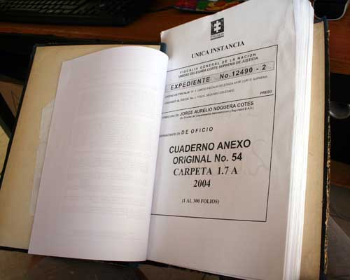 Chuzadas del DAS - Colombia